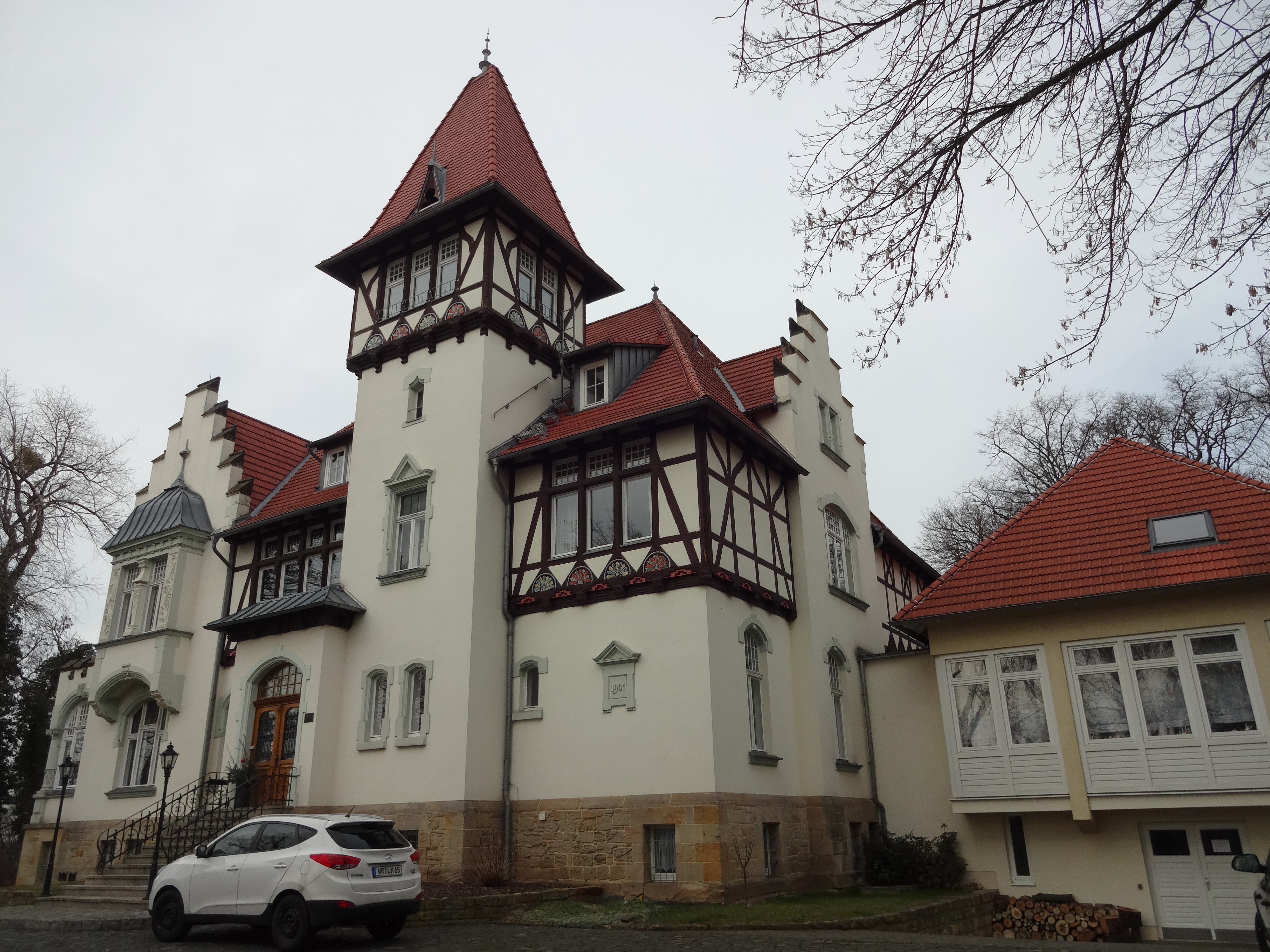 denkmalgeschützte Villa in der Schloßstraße 15 in Derenburg, Ortsteil von Blankenburg (Harz)